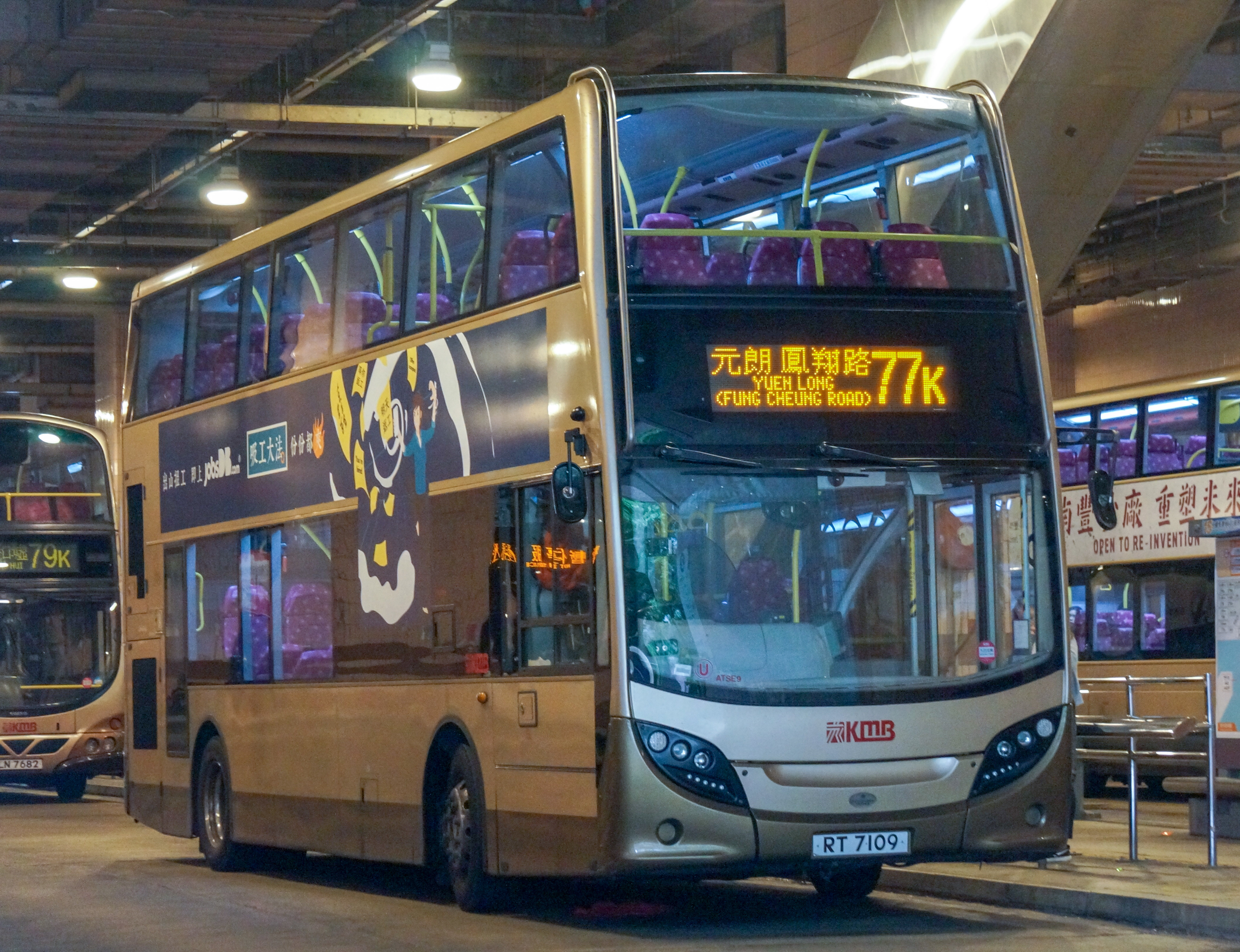 RT7109/ATSE9 停泊於上水總站